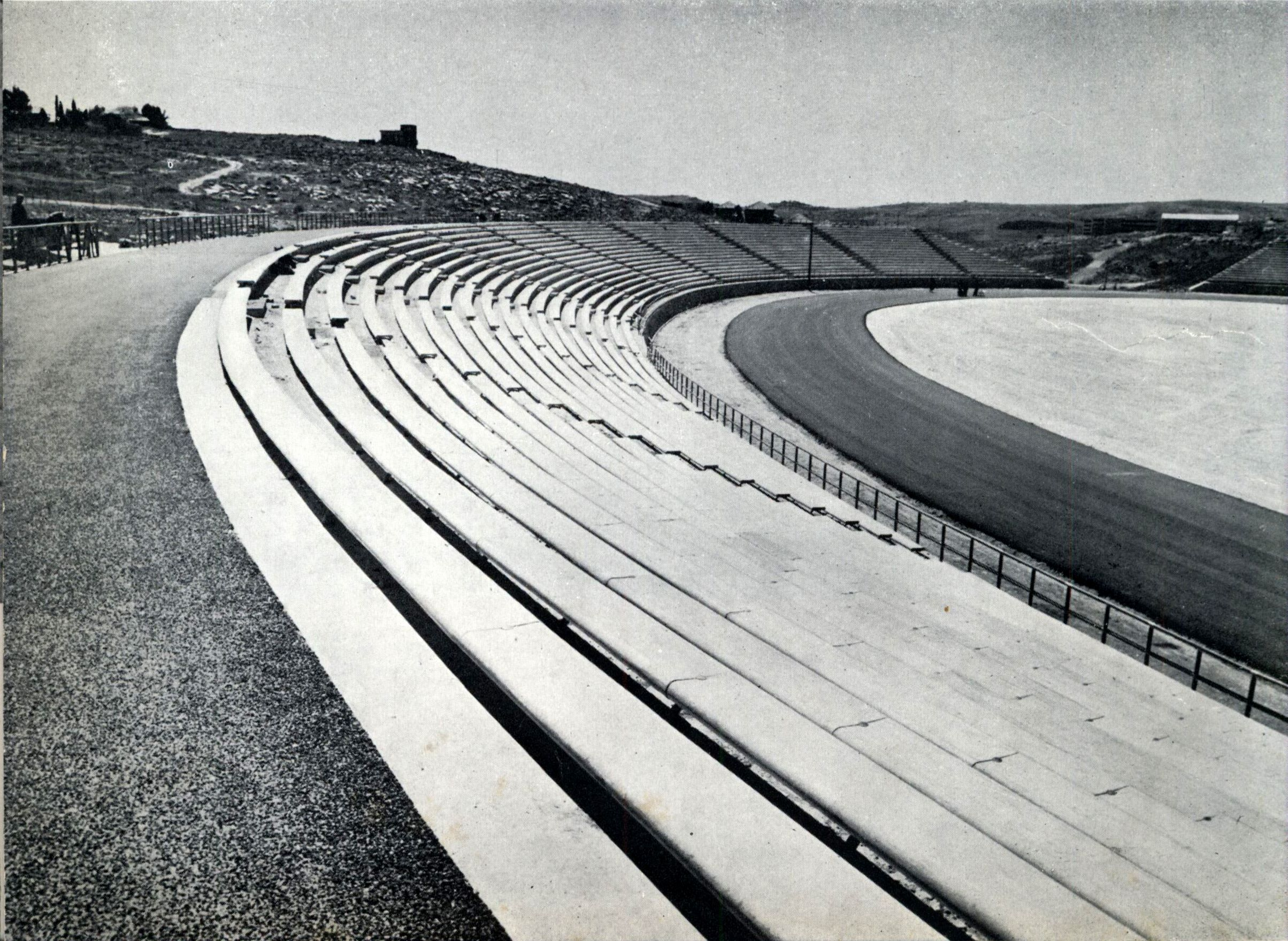 האצטדיון הלאומי והאוניברסיטאי. הוקם בשיתוף עם האוניברסיטה העברית לפי תכנון כללי של האדריכל קלרווין ותכנונה המפורט של מ.ע.צ. 16,600 מקומות ישיבה, אך ניתן להוסיף ספסלים על גבי הסוללה. מגרשי הספורט הושלמו ע"י האוניברסיטה במתכונת המקובלת באולימפיאדות. נחנך בחגיגות יום העשור במעמד 20,000 צופים.